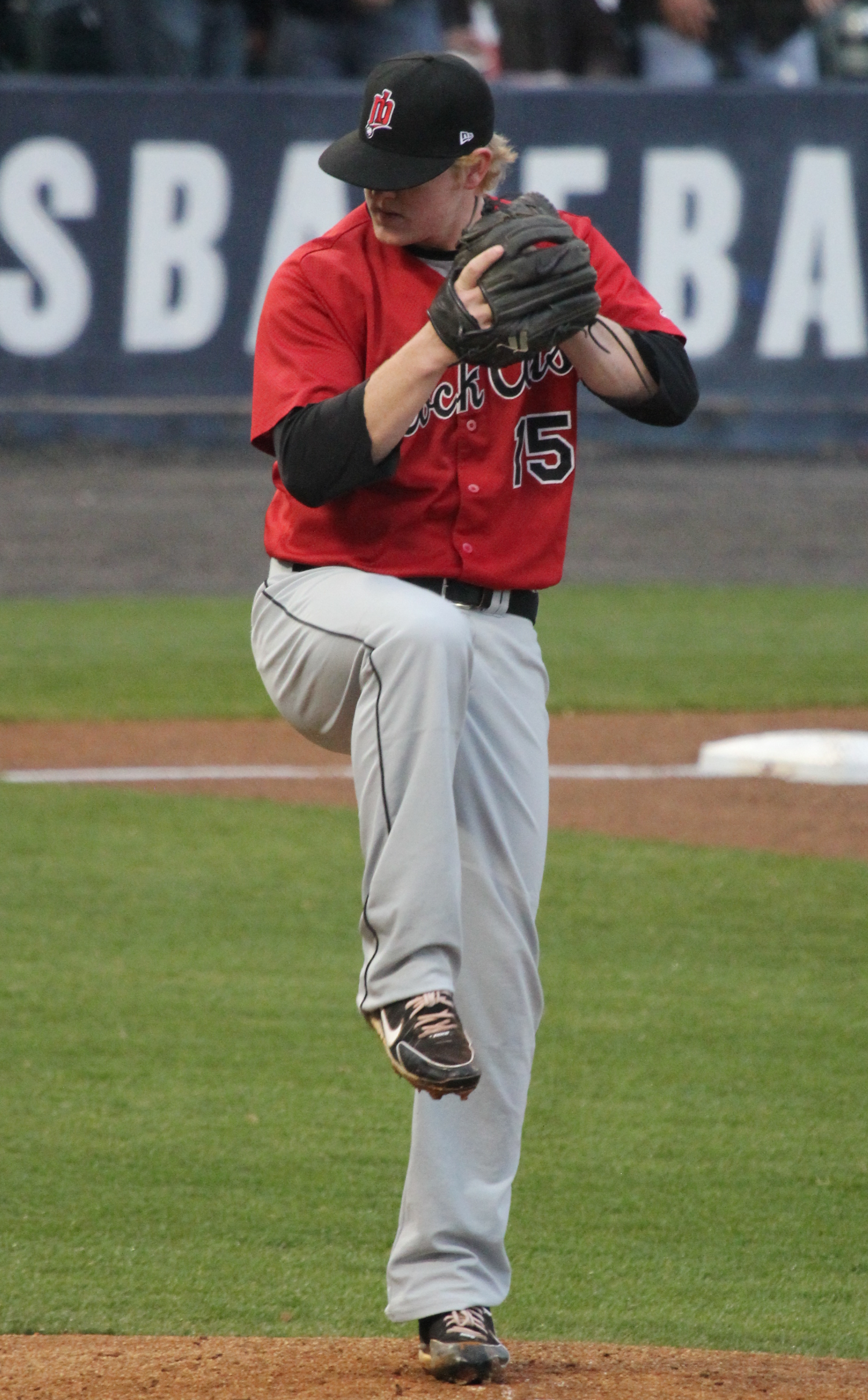 Logan Darnell